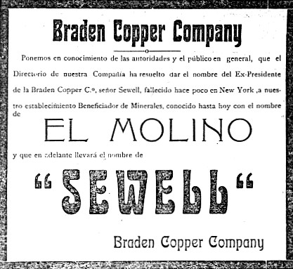 Inserto de periódico en el cual la Braden Copper Co. anuncia el renombre de su establecimiento minero como "Sewell", en honor a Barton Sewell, 1915.